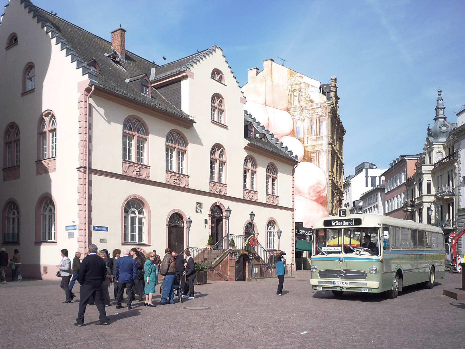 Wiesbaden: ESWE-Stadt-Bus von 1961 vor dem Alten Rathaus (Marktstraße) auf dem Schlossplatz